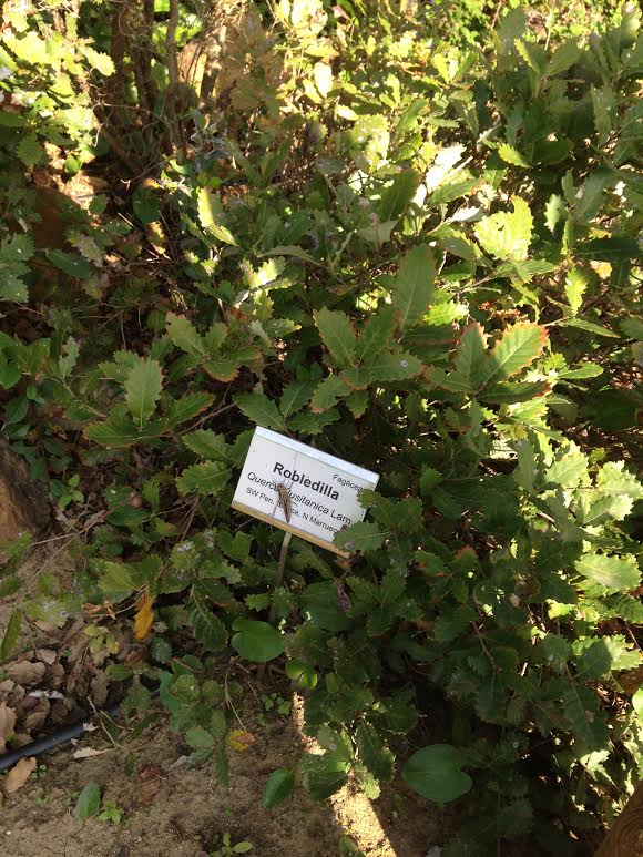 Robledilla o Quejigueta en castellano, arbusto de pequeño porte. Foto tomada en el Jardin Botanico del Aljibe, en Alcala de los Gazules